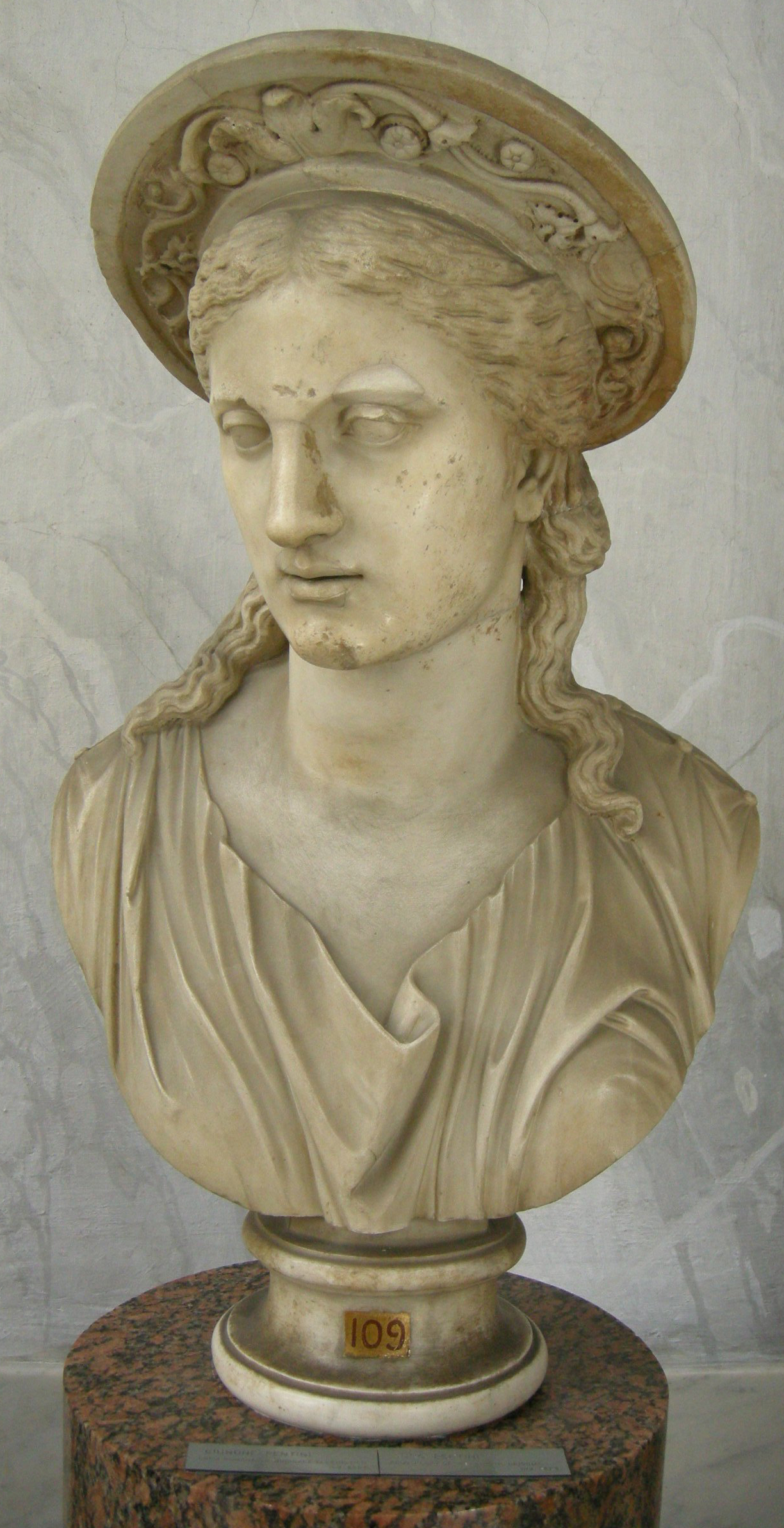 Giunone Pentini, copia romana da originale ellenistico. Musei Vaticani, Museo Chiaramonti - Braccio Nuovo; inv. 2224.